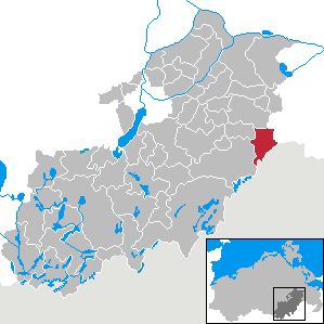 Mildenitz in Mecklenburg-Vorpommern, Landkreis Mecklenburg-Strelitz